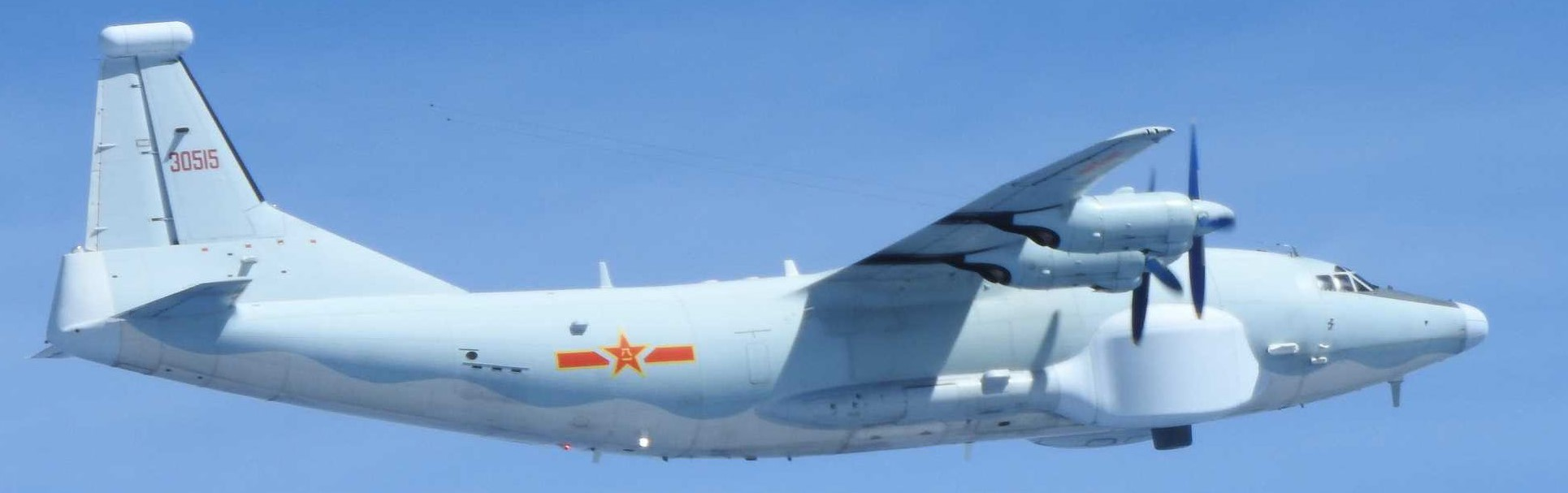 中文（台灣）: 中國解放軍海軍航空兵高新4號